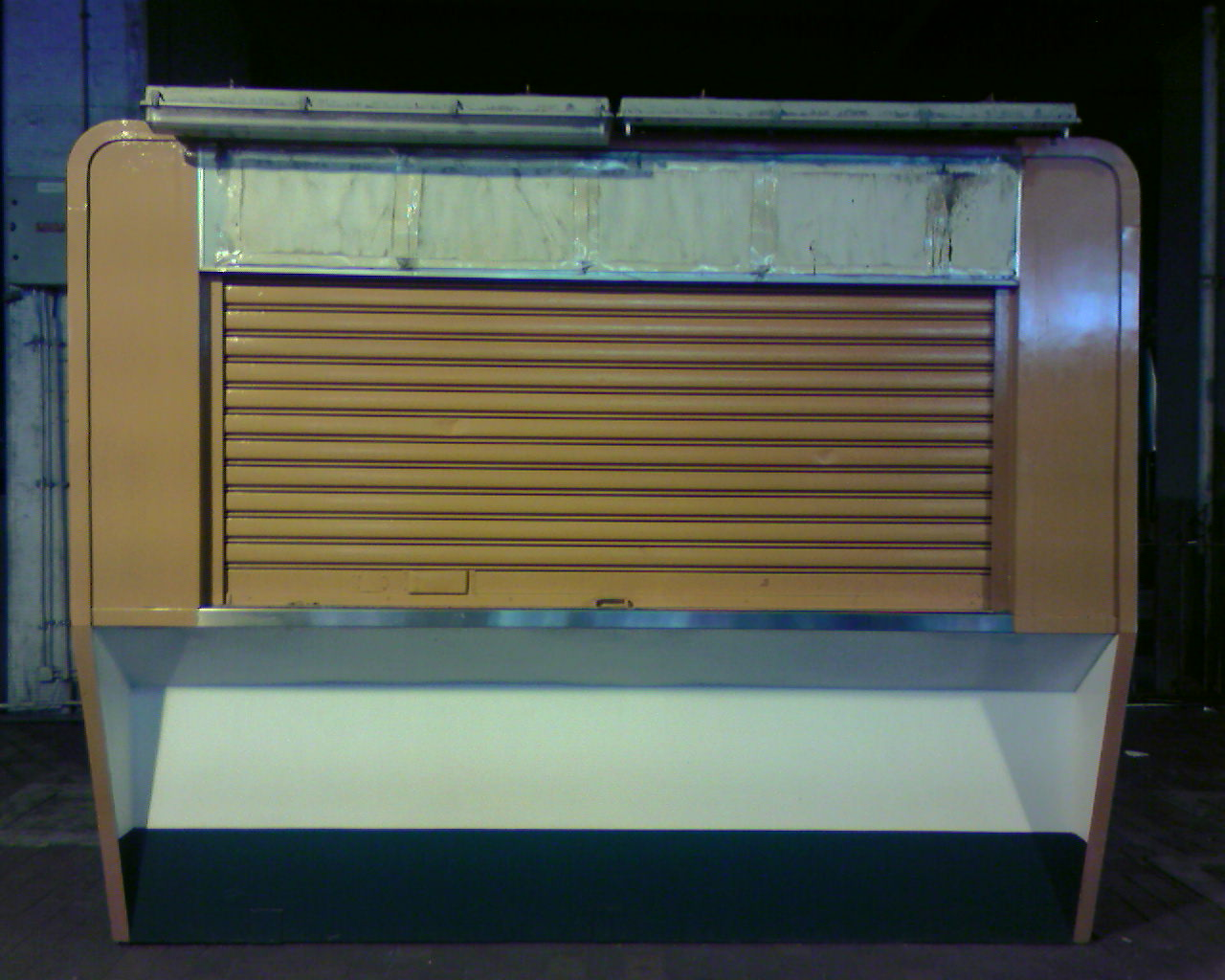 中文（香港）: 輕鐵已荒廢的客務中心，攝於良景站2號月台。